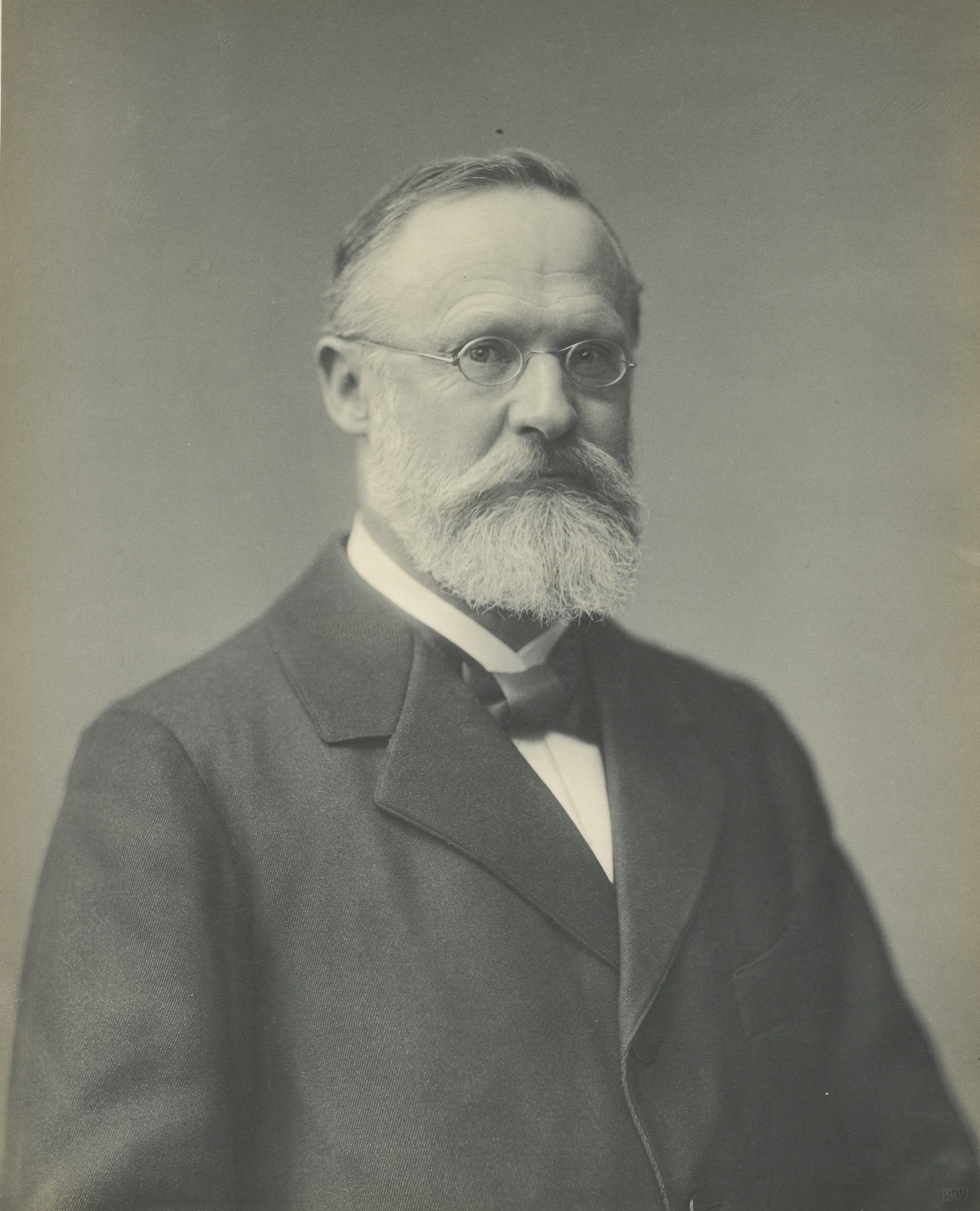 Wilhelm Heinrich Erb, Mediziner, 1865–1880 & 1883–1921 Professor in Heidelberg, 1893 Rektor